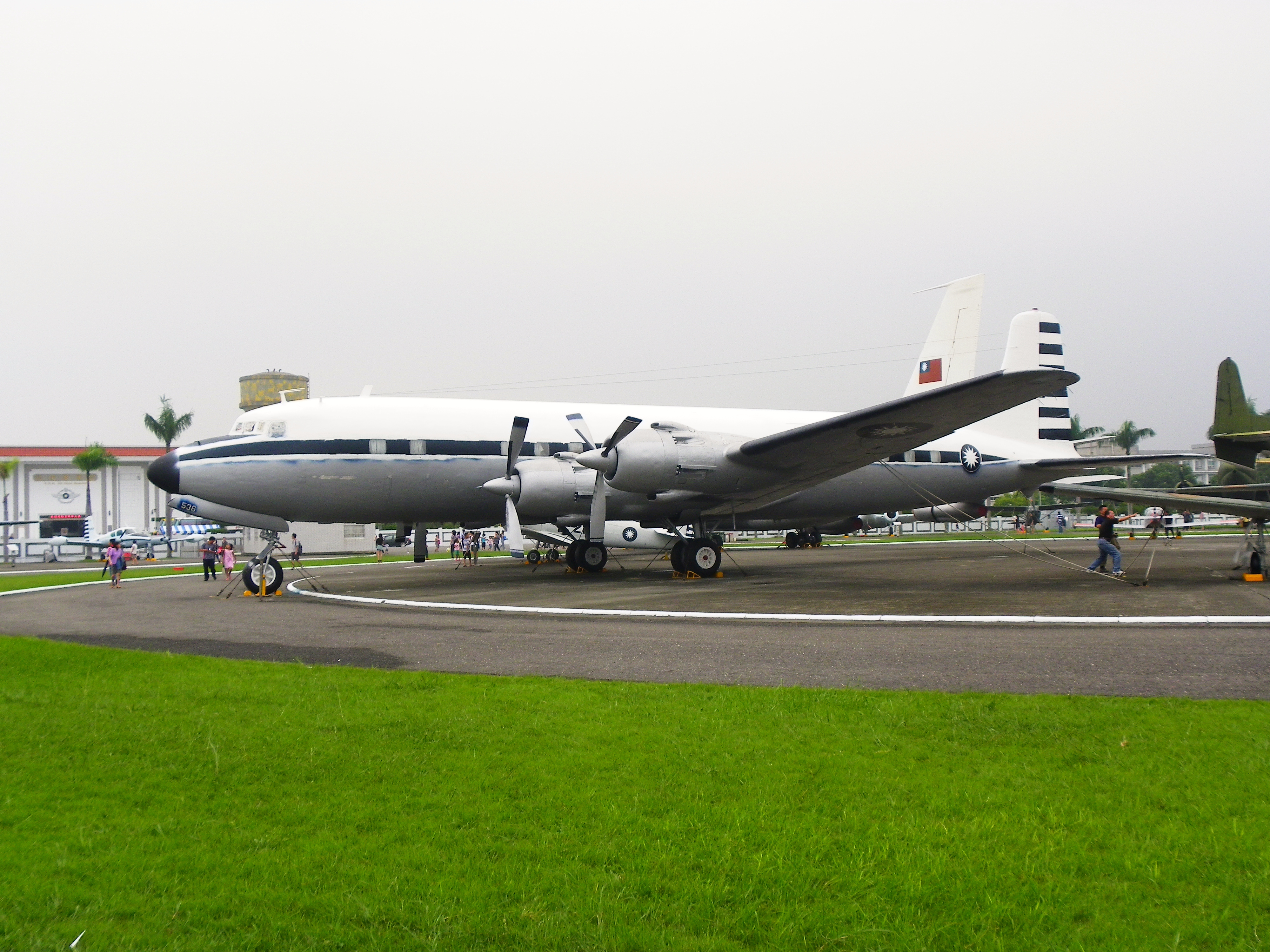 中華民國空軍C-118舉重霸王式運輸機，1966年起服役擔任專機。